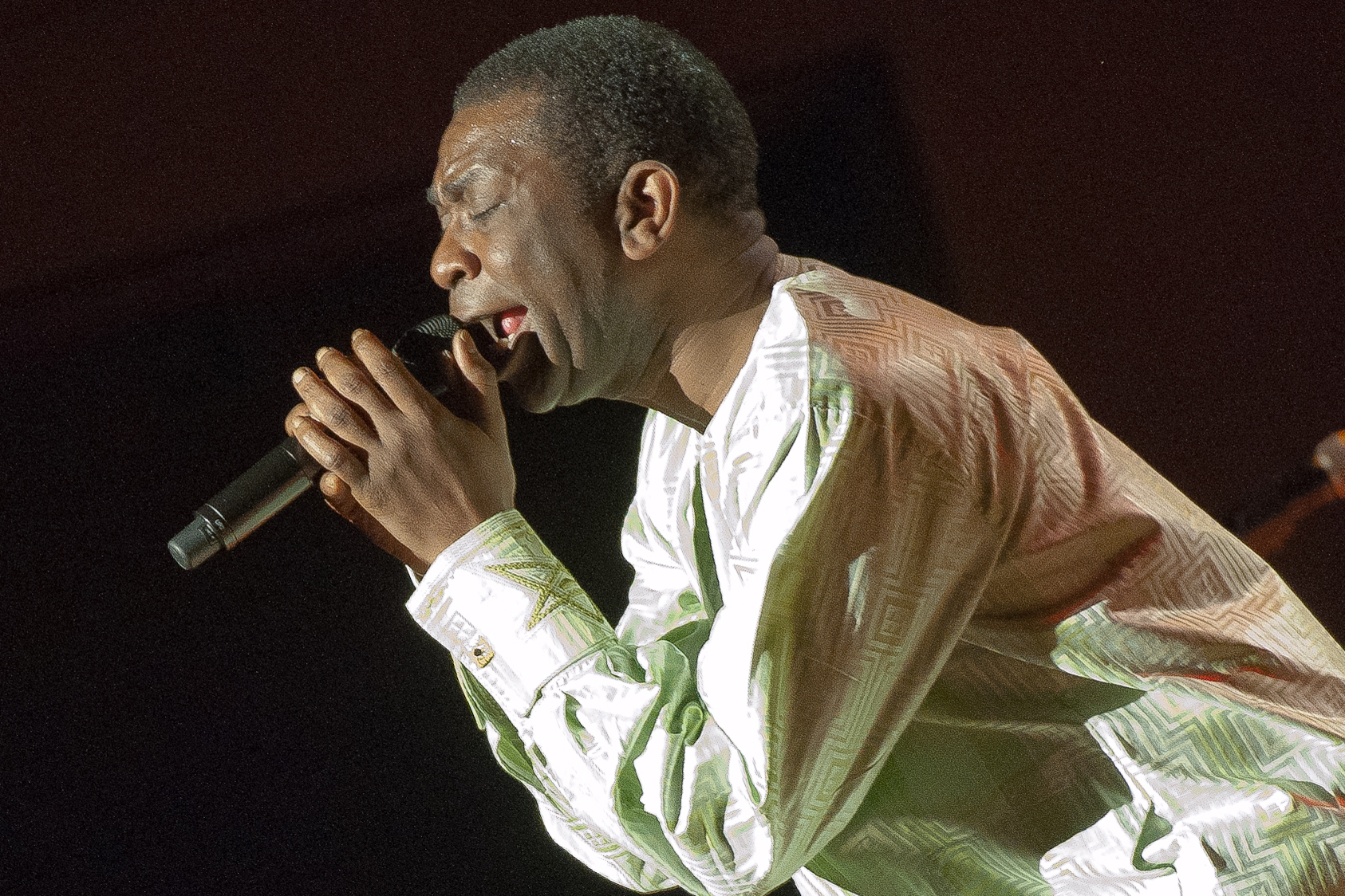 Youssou N'Dour tijdens een concert in de Bozar te Brussel